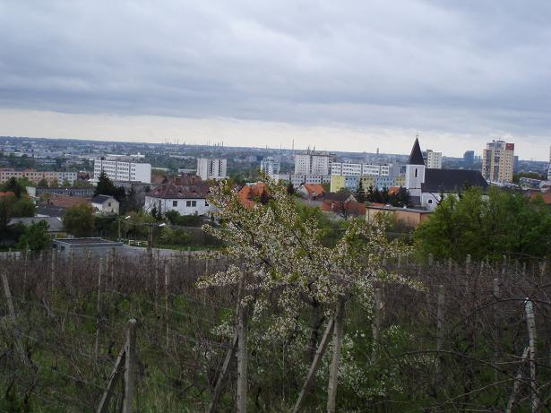 Stará Rača